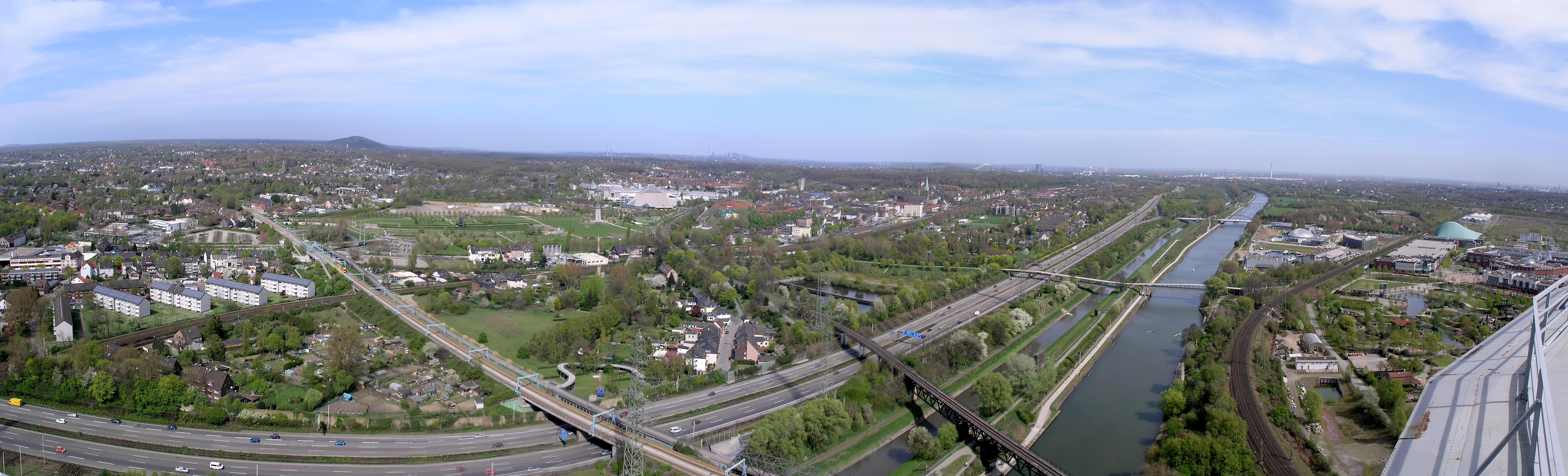 Северный Рейн - Вестфалия, Оберхаузен. Газометр